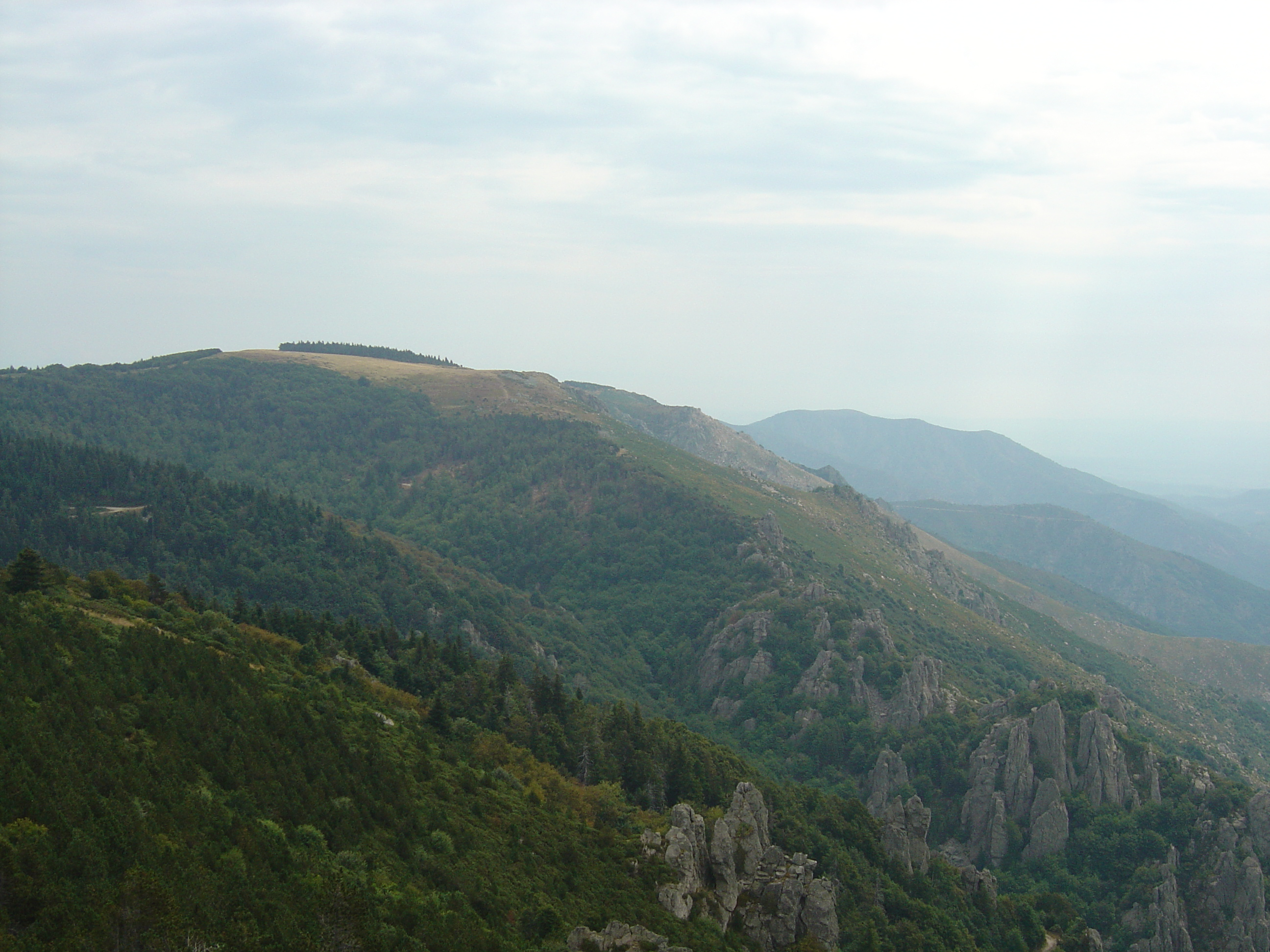 Le sommet Méjan (1458m) et les crêtes du Tanargue et le Cham du Cros (1202m) vus depuis le signal de Coucoulude (1448m)